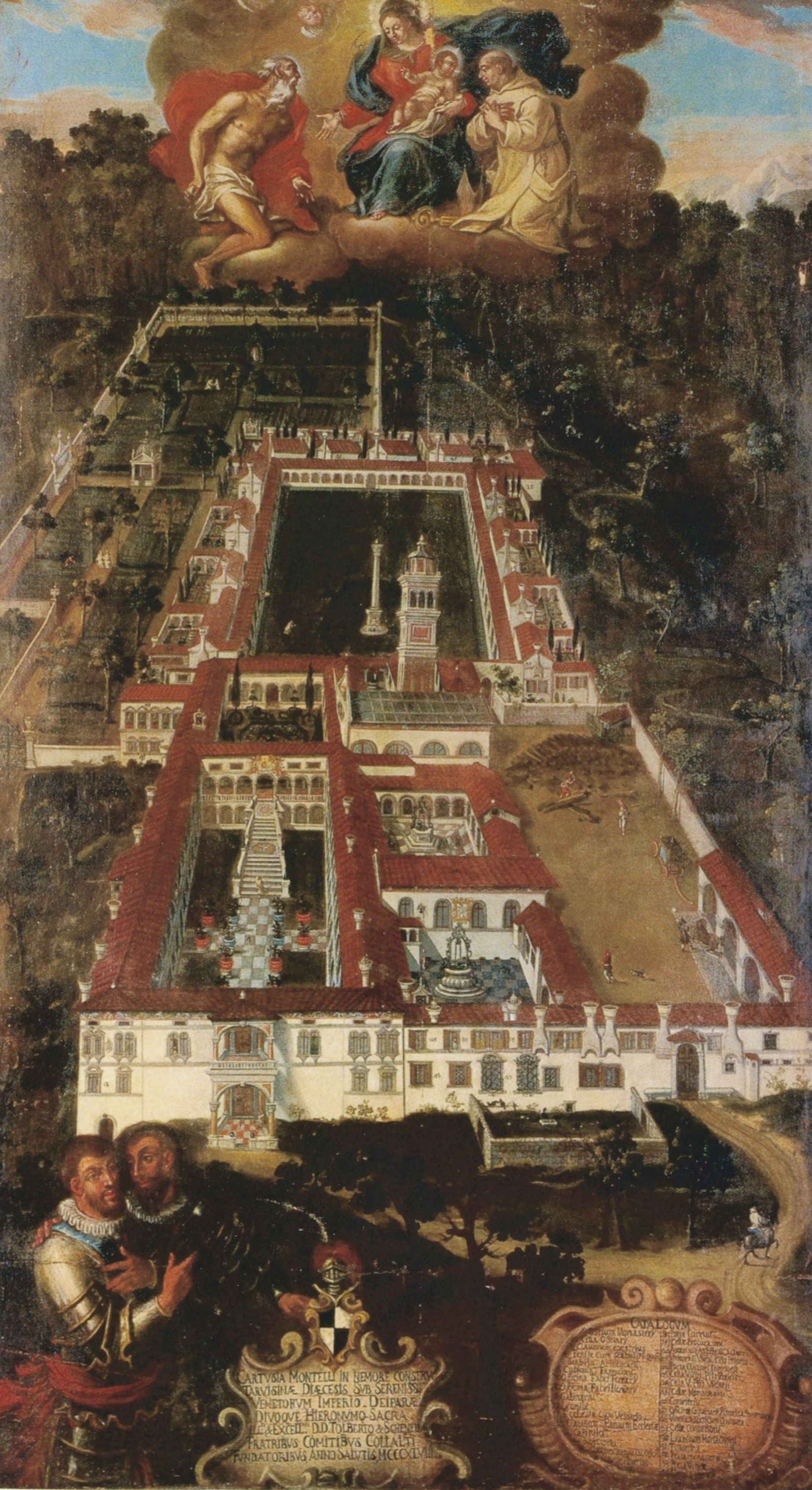 Tableau de la fin du XVIIe siècle dans le Musée de la Grande Chartreuse